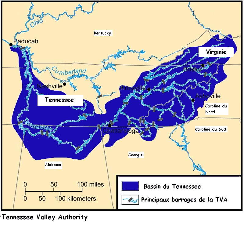 Carte de la TVA, document personnel